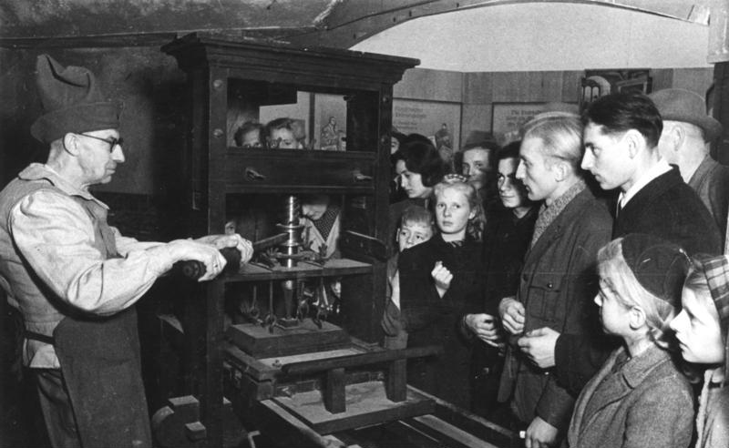 Düsseldorf, Presseausstellung, Gutenbergpresse Illus-dpd Von der Düsseldorfer Presseausstellung: Ein "Schweizer Degen" an der Gutenbergpresse. Großes Interesse fand bei den Besuchern der Presseausstellung in Düsseldorf die historische Abteilung. Unser Bild zeigt einen Drucker in historische Berufstracht an der Gutenbergpresse. 950-47